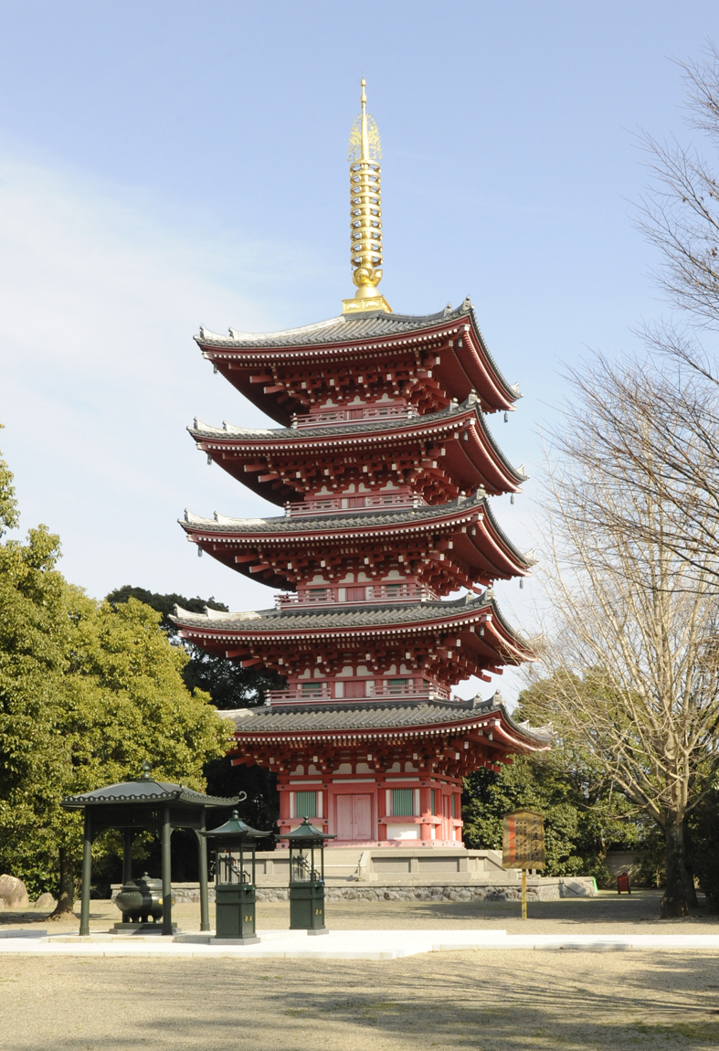 五重塔（西側外観）